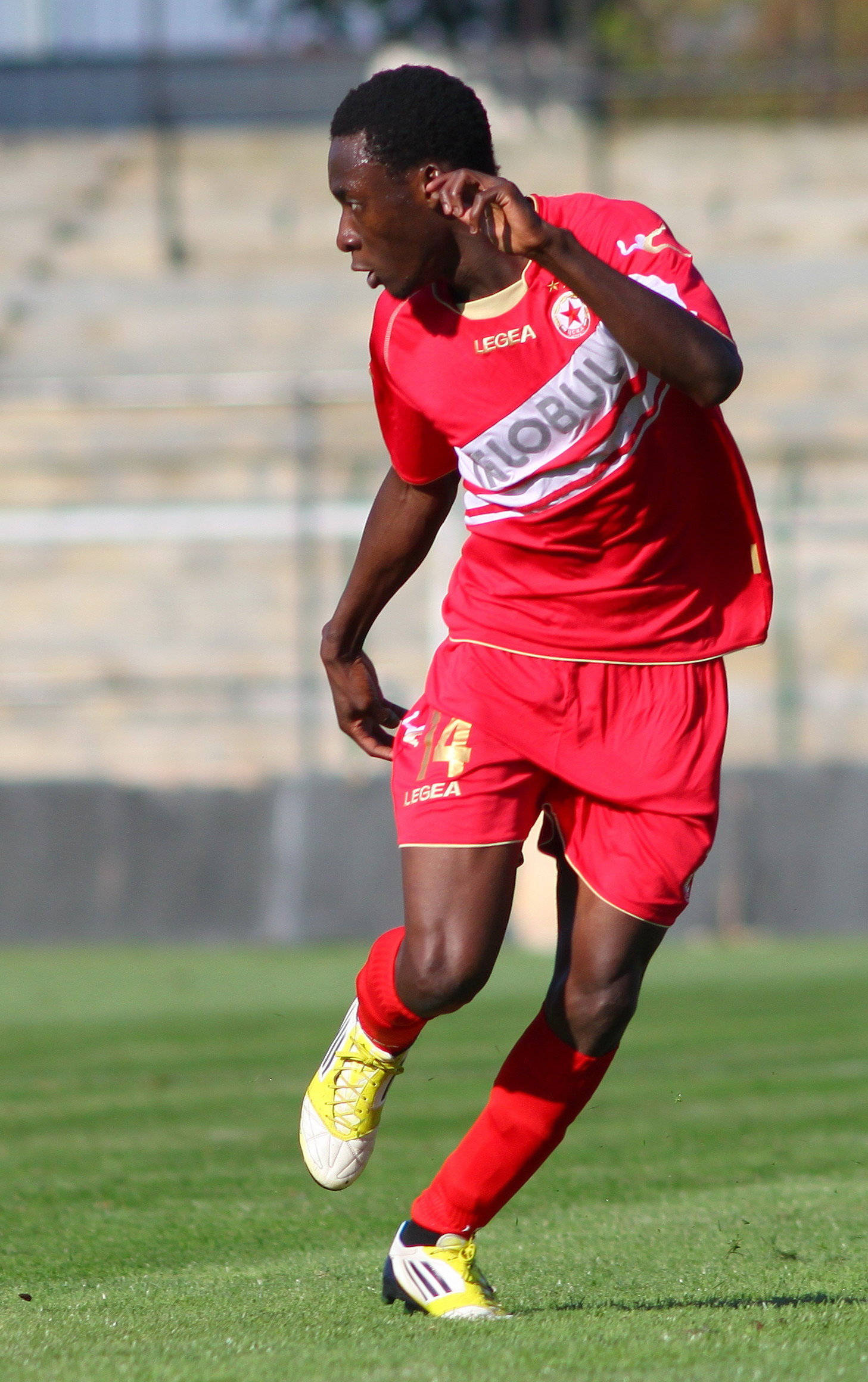 Серж Нюаджи - френски футболист от тогоански произход, състезател на ПФК ЦСКА София.